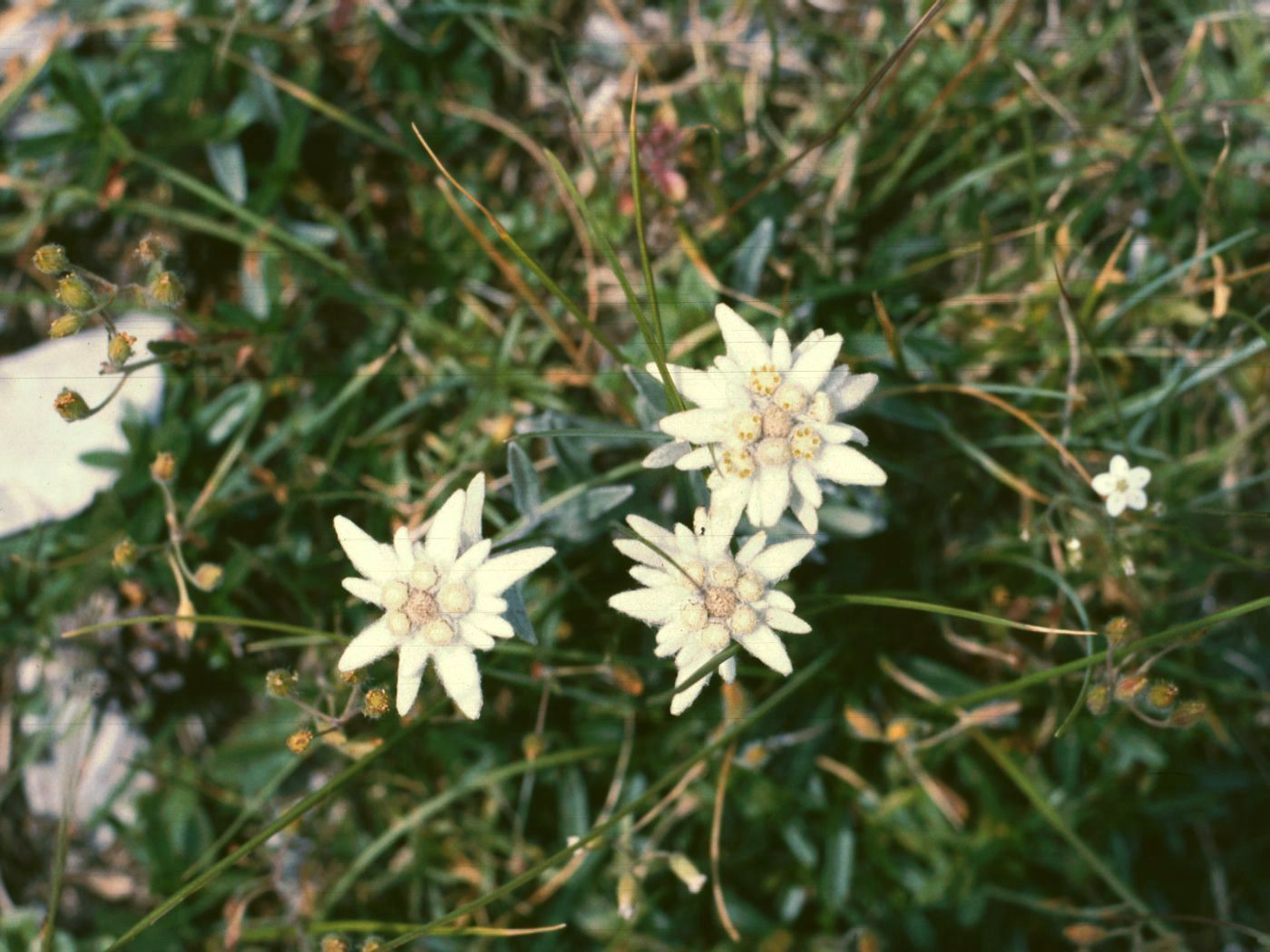 Edelweiß Leontopodium alpinum, Korbblütengewächse (Asteraceae) - Rumänien/România: Südkarpaten, Retezatgebirge, Piatra Iorgovanului, Kalk, ca. 1800 m Seehöhe